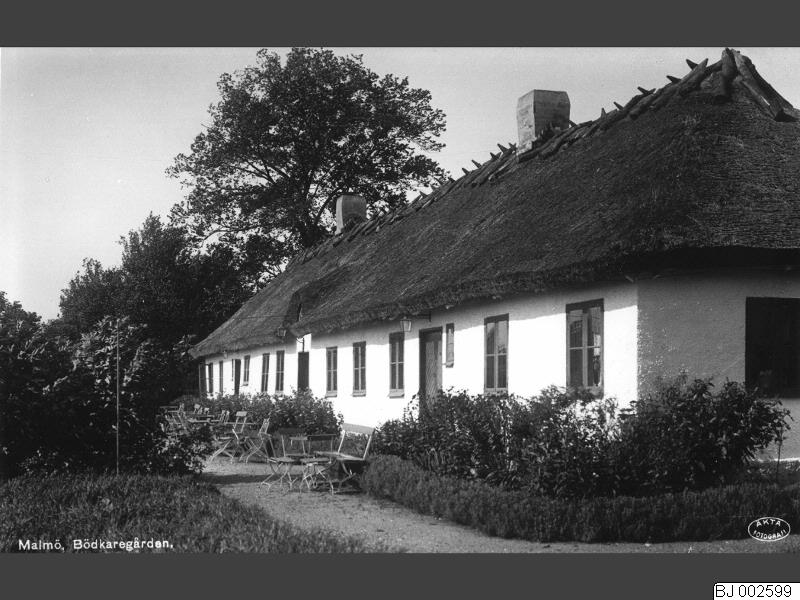 Vykort föreställande värdshuset Bödkaregården i Malmö 1928